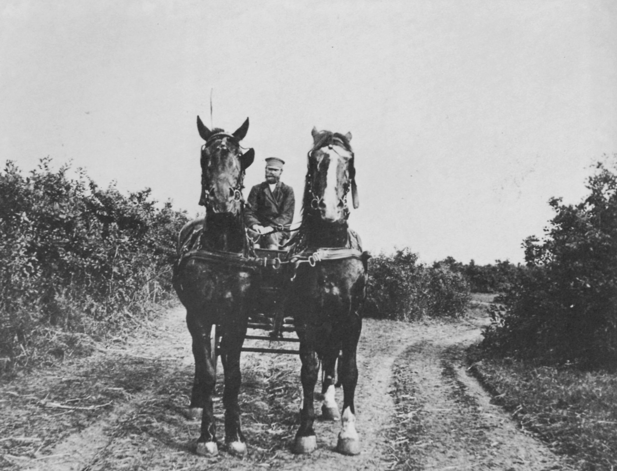 Russischer Photograph: Verwalter